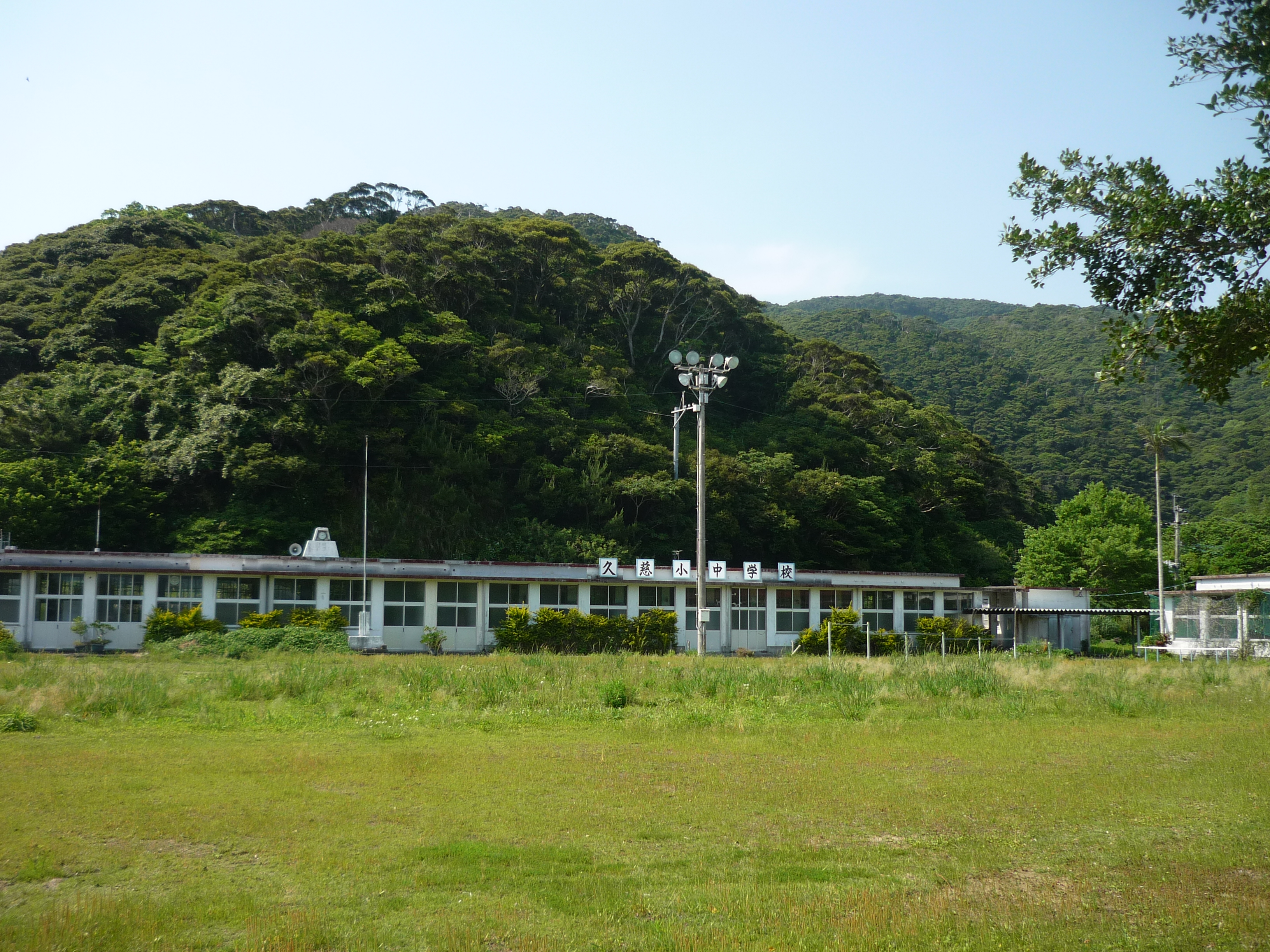 瀬戸内町立久慈中学校・久慈小学校